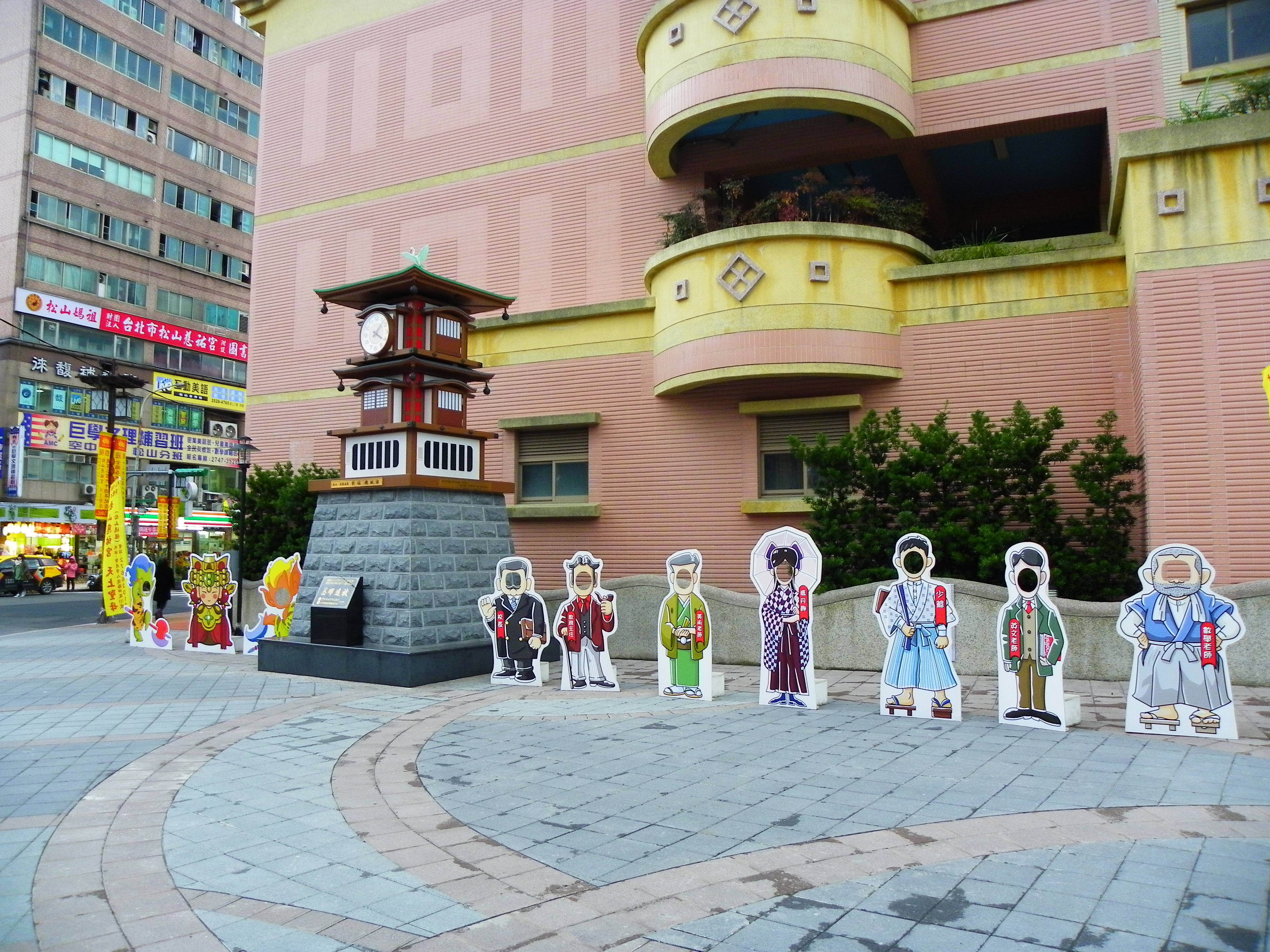 臺北市松山慈祐宮前、松山國小西側的松山慈祐宮建宮260週年紀念鐘塔，2013年10月13日立，日本愛媛縣松山市捐贈。2011年東日本大地震，松山慈祐宮與臺灣各界捐輸賑災不遺餘力，愛媛縣松山市感念恩德，特樹斯塔於同名之地，以彰義風。鐘塔左側是媽祖與千里眼、順風眼立牌，右側是相傳夏目漱石以愛媛縣松山市為背景的小說＜坊っちゃん＞（少爺）人物立牌，供遊客攝影留念。